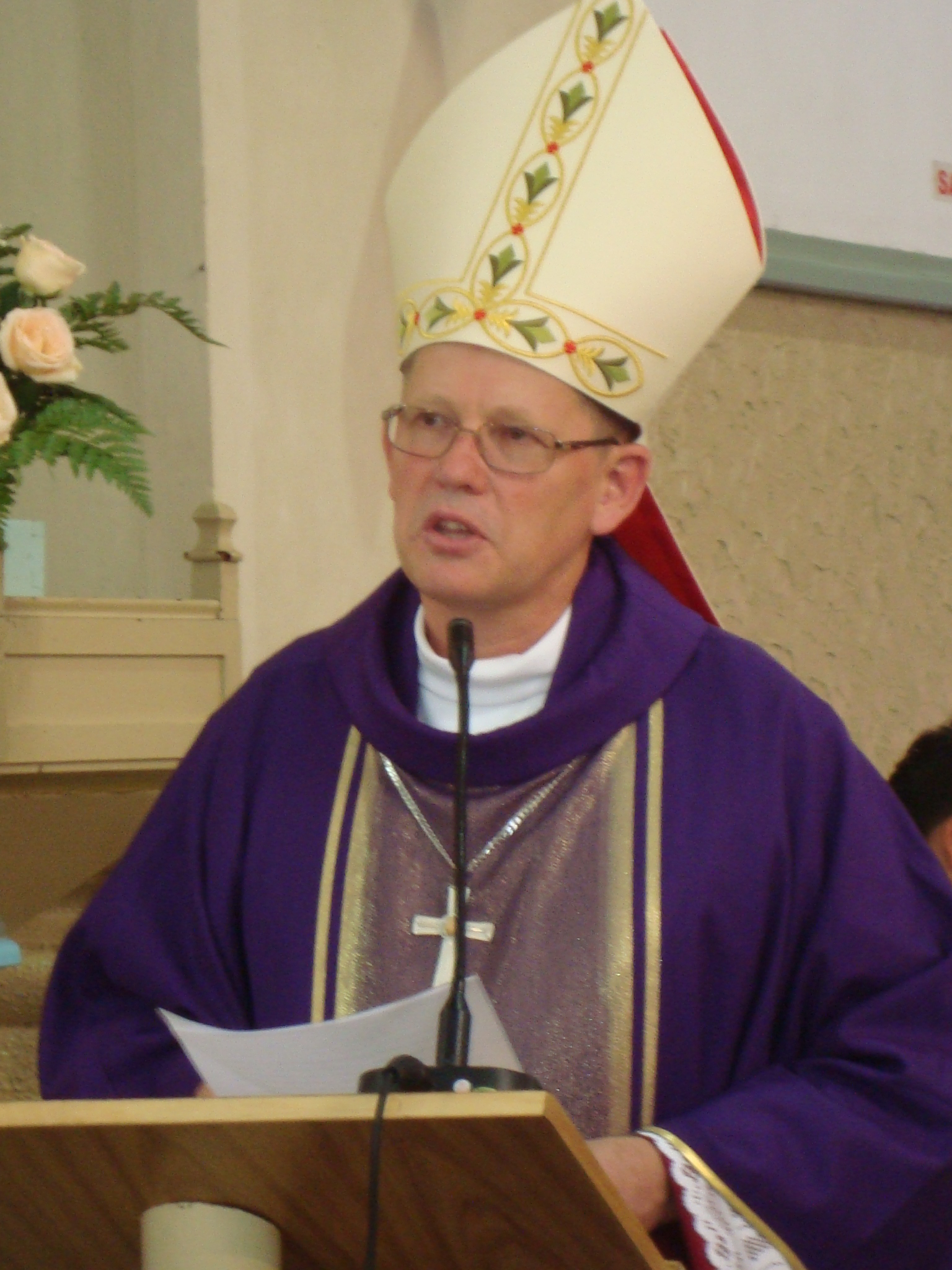 Dom Jaime Spengler - Arcebispo Metropolitano da Arquidiocese de Porto Alegre